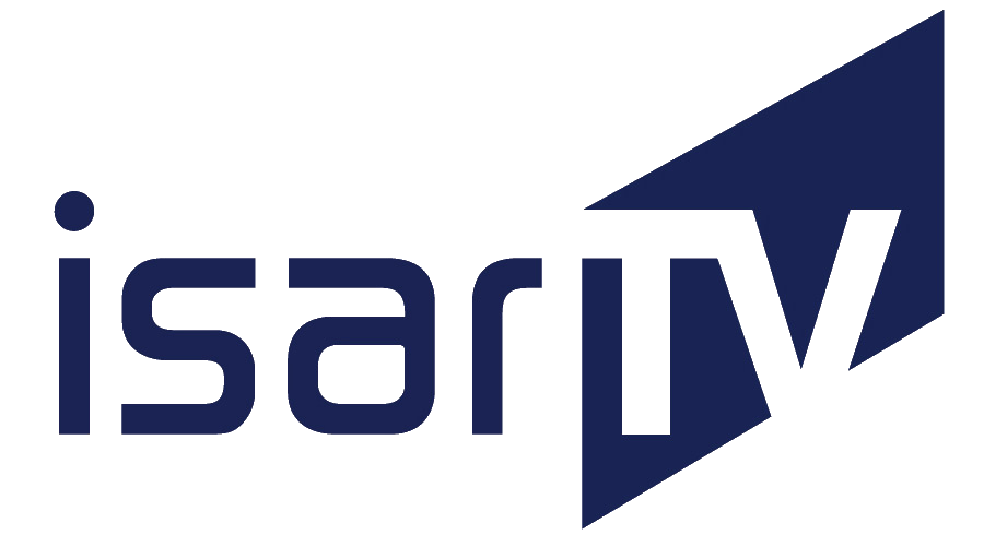 Logo des Senders Isar TV